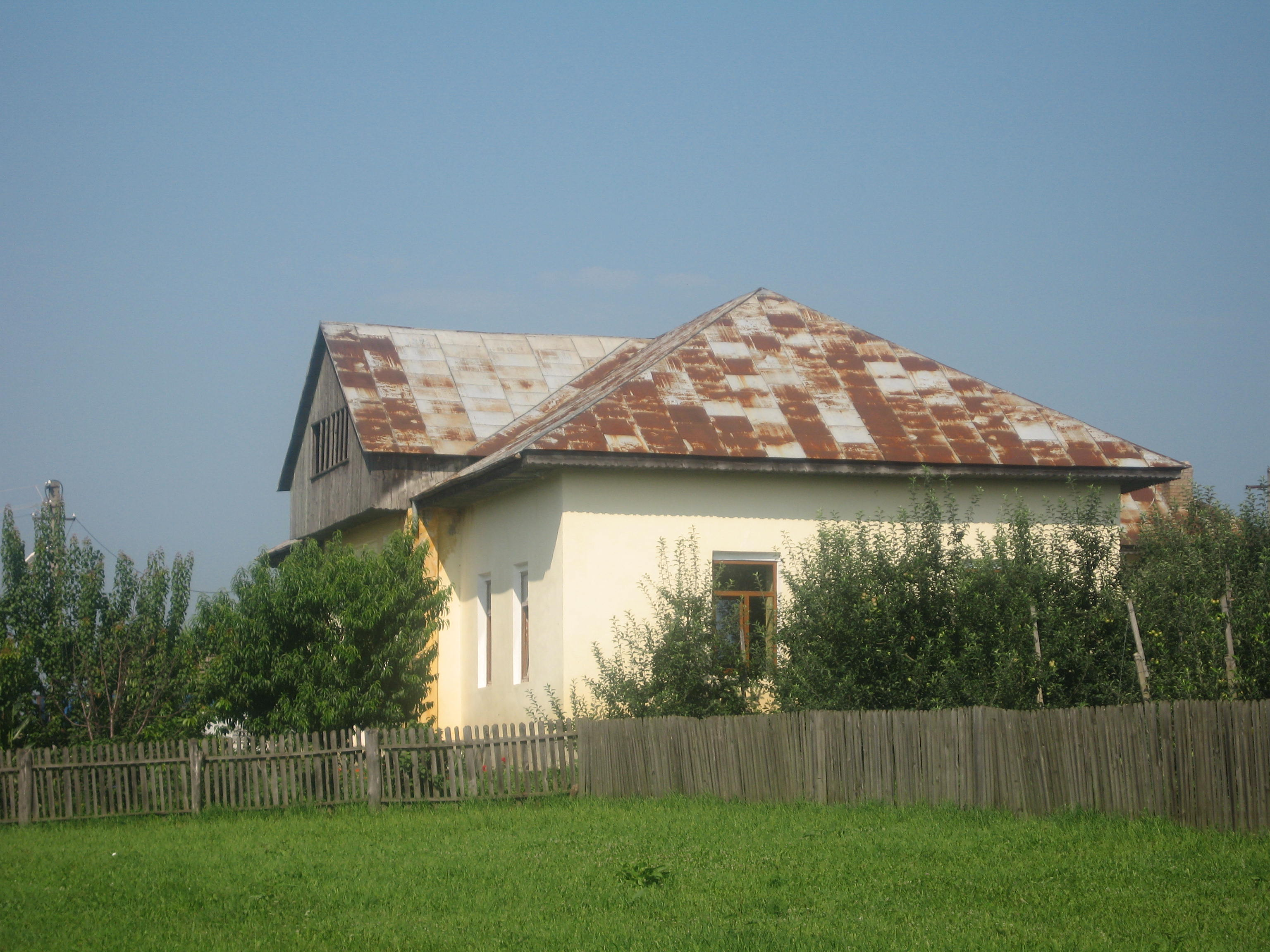 Casa Nicolae Istrati din Rotopănești, județul Suceava, România.